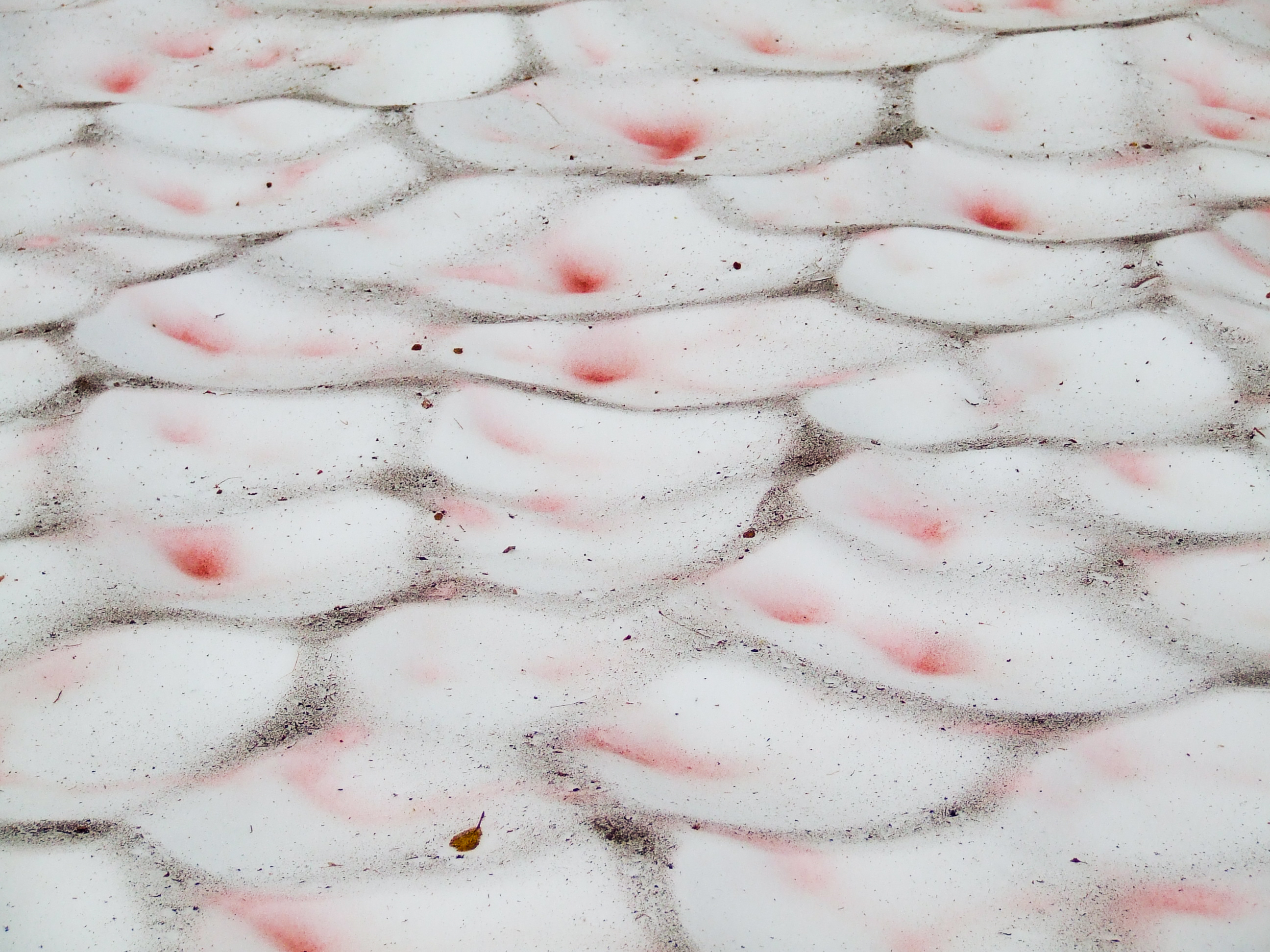 Schneefläche mit Chlamydomonas nivalis (Blutschnee) in der Nähe von Abisko (Nordschweden)